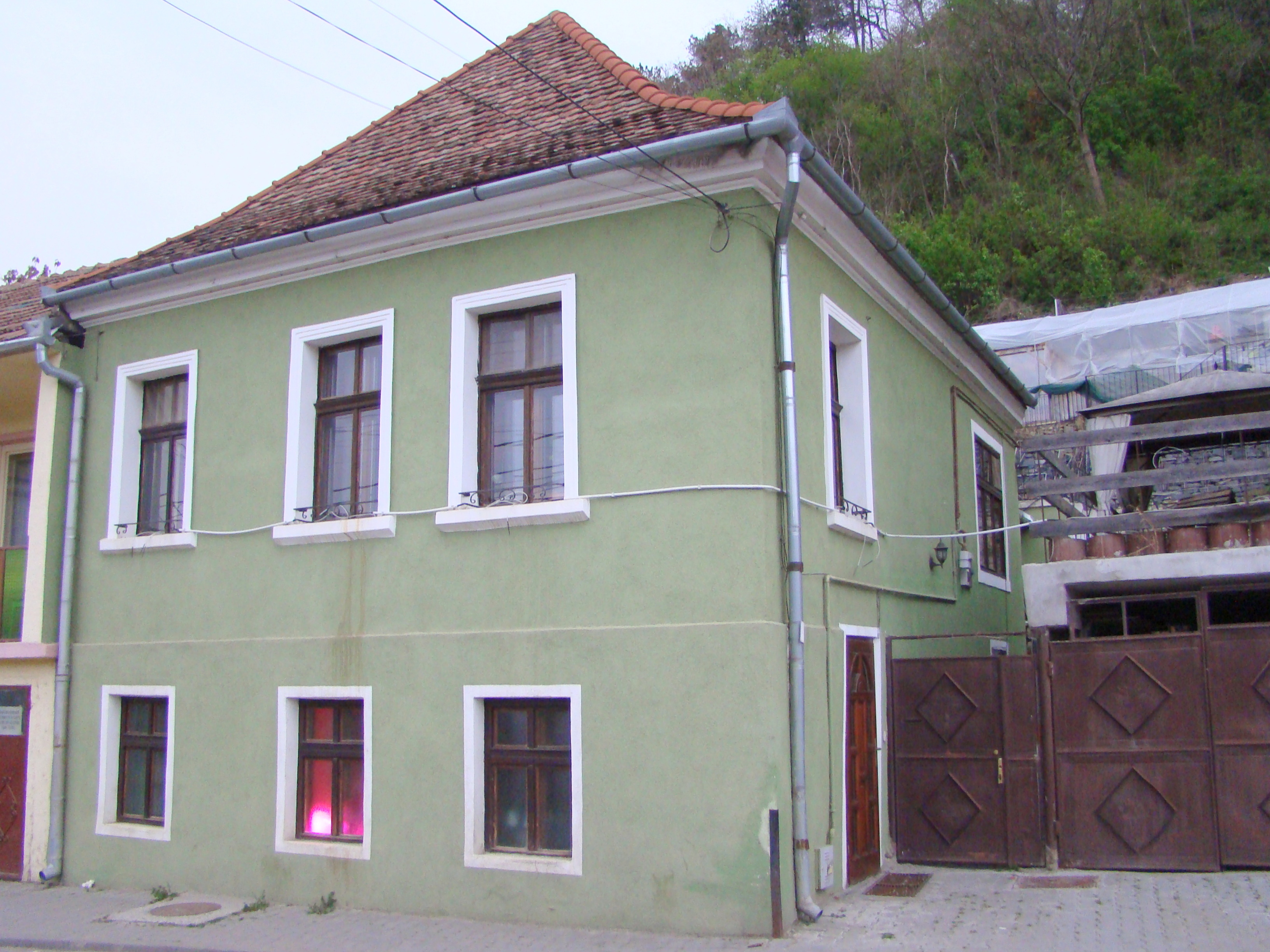 Casă, municipiul Sighișoara, str. Chendi Ilarie 62 1700